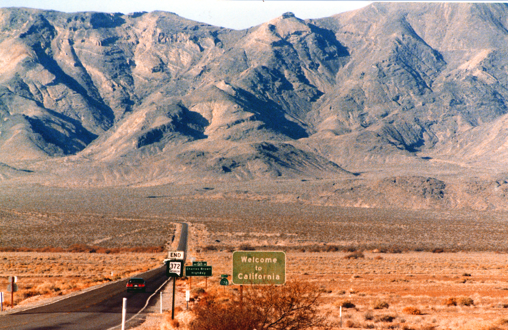 State Line